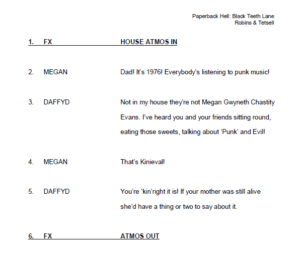 Ejemplo de Guión radiofónico americano